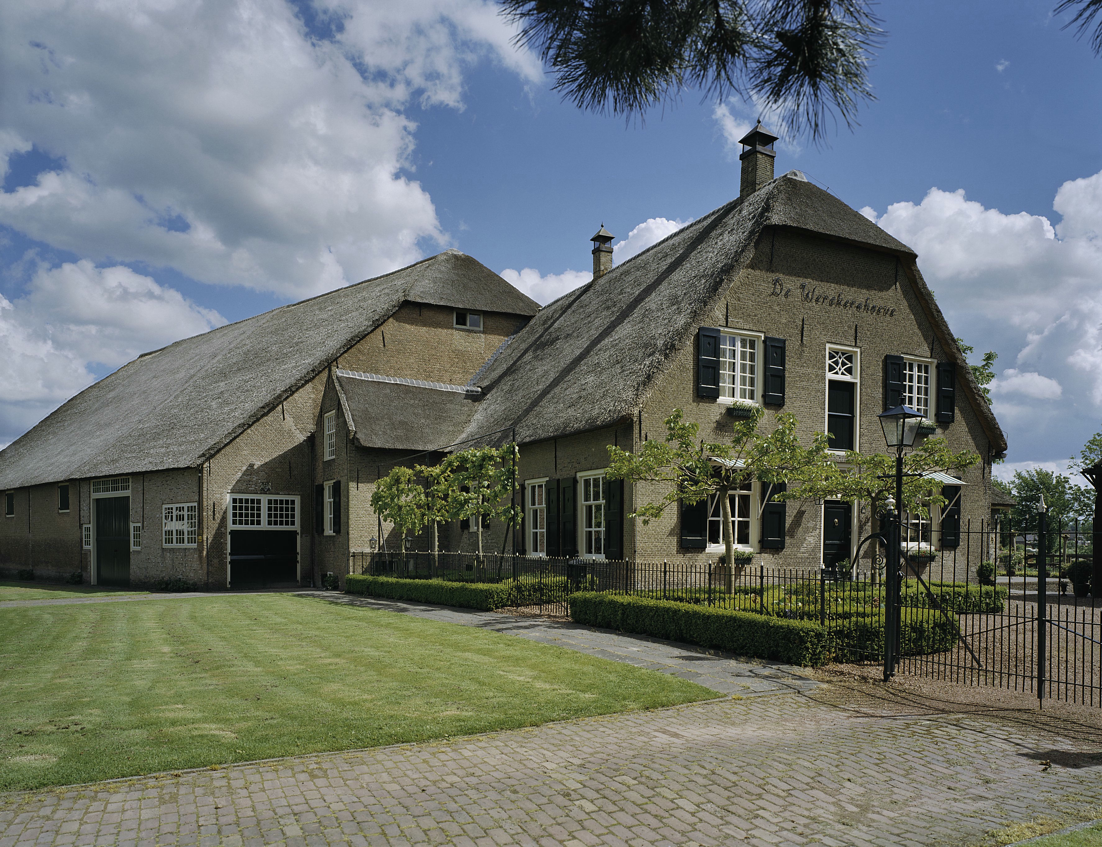 Boerderij De Werkershoeve: Overzicht voorgevel boerderij met schuur (opmerking: Gefotografeerd voor Monumenten In Nederland Zuid-Holland)